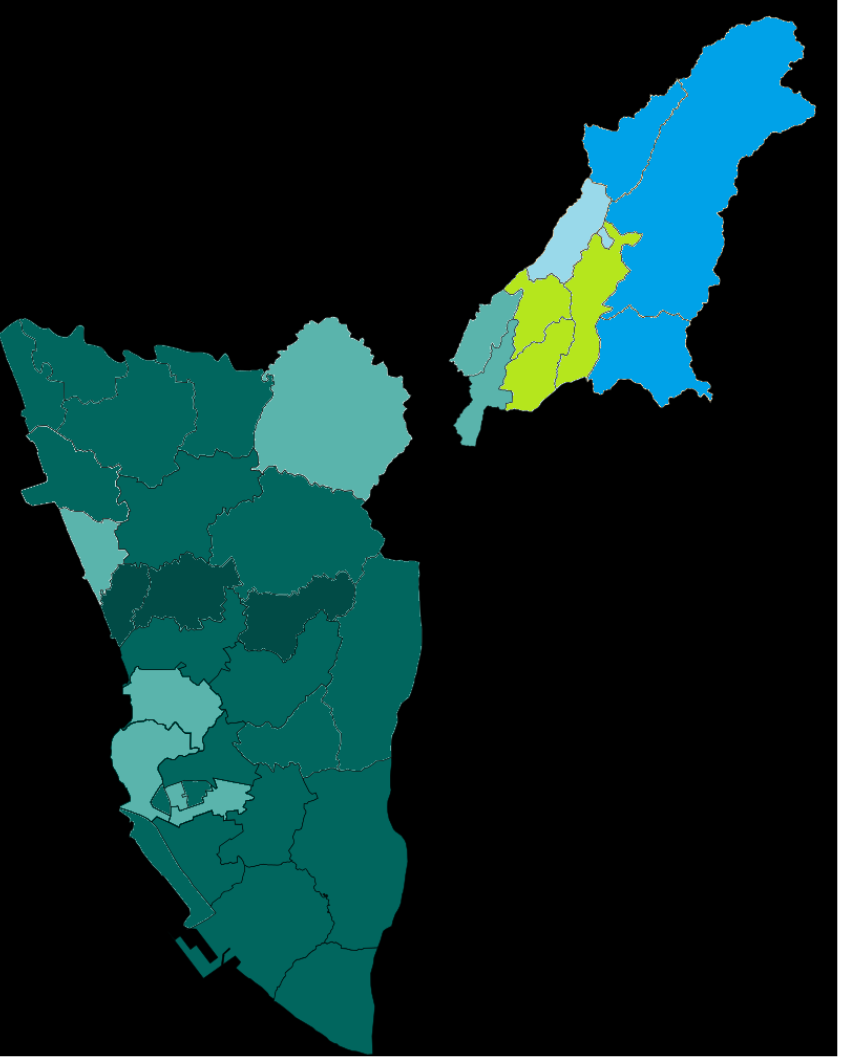 深藍 同意票小於10% 淺藍 同意票小於25% 淺綠 同意票小於30% 中綠 同意票小於40% 深綠 同意票小於45% 極深綠 同意票大於45%